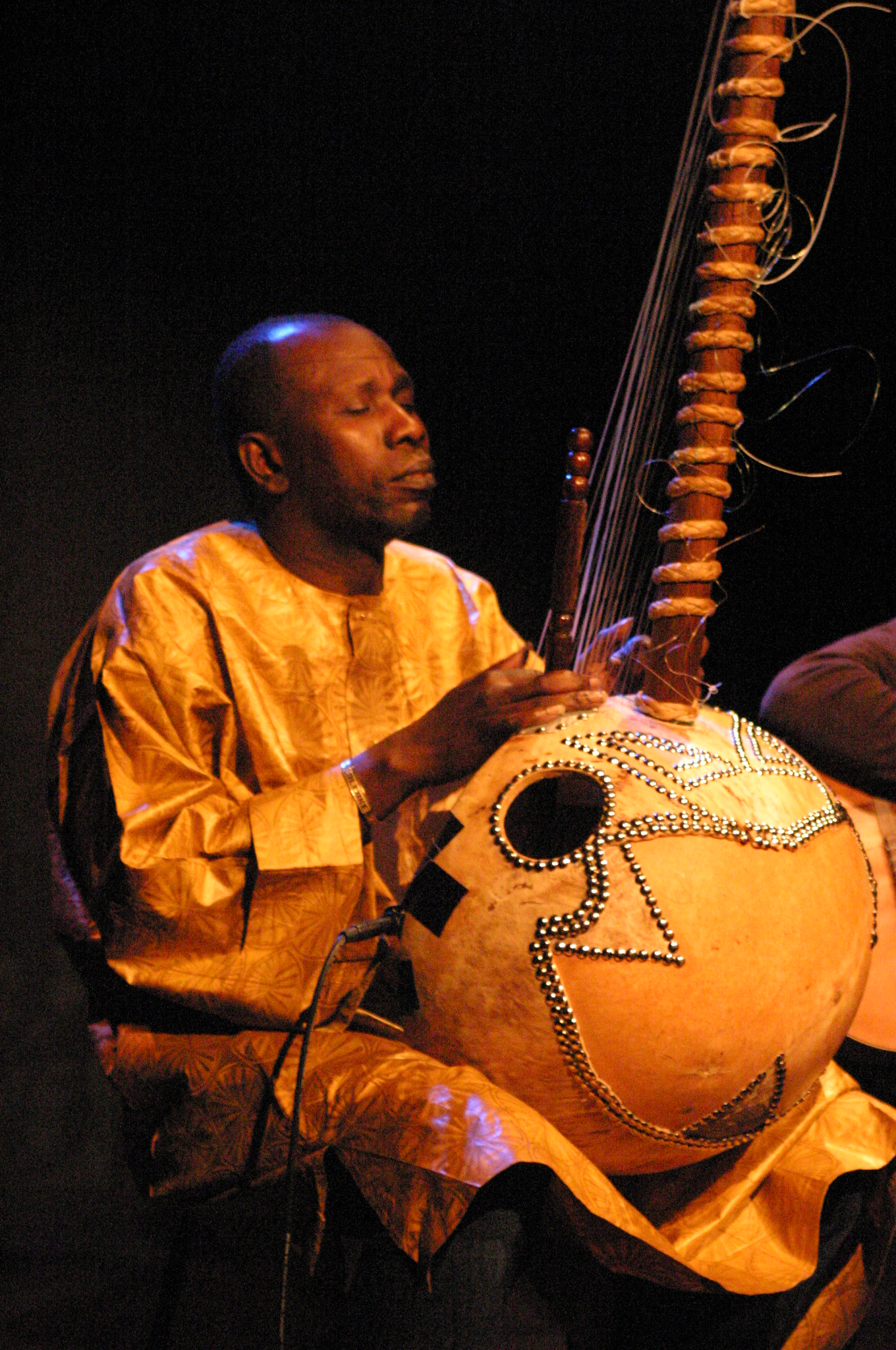 Ballaké Sissoko 2009-04-16